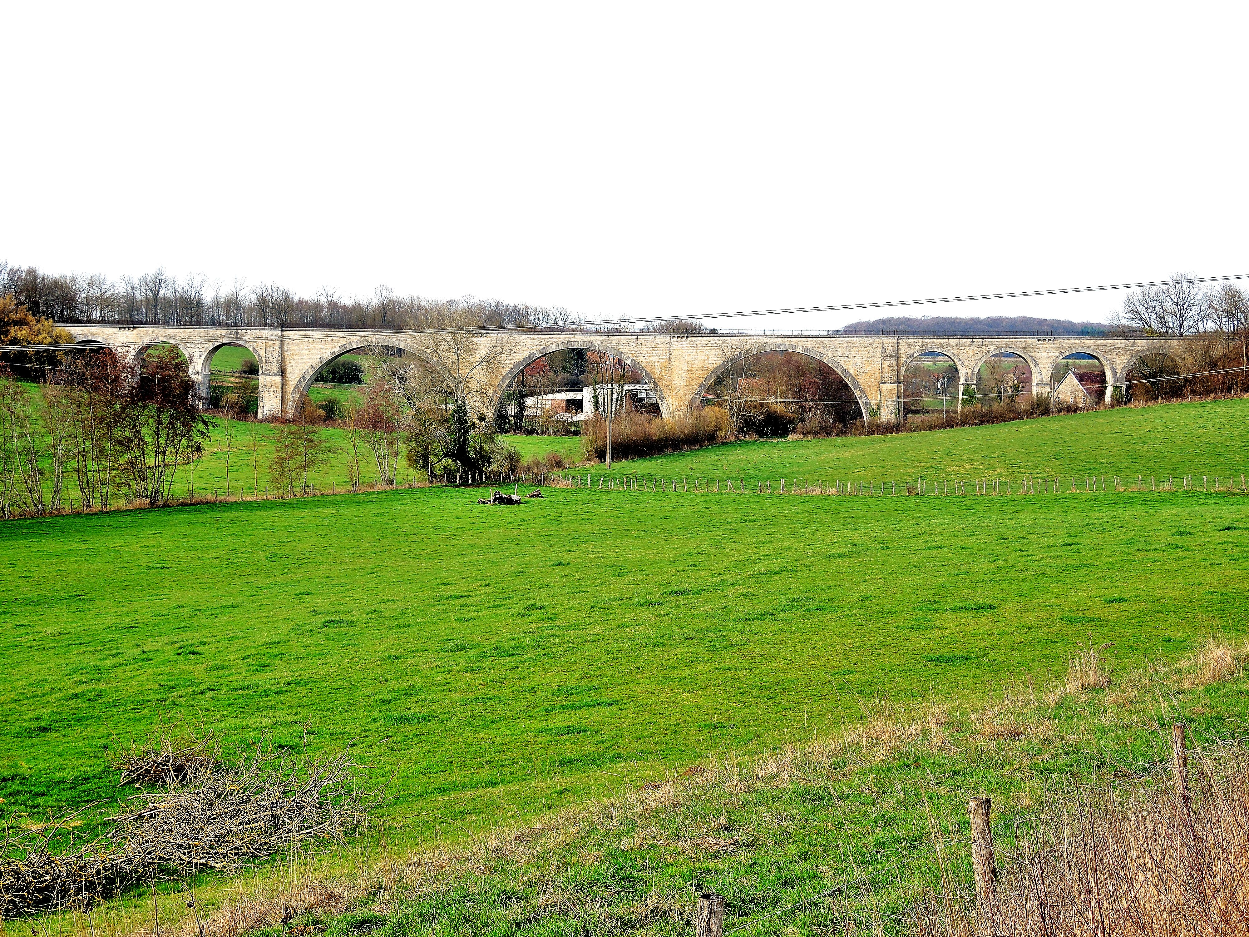 Ancien viaduc du tram, au lieu-dit "saut de Corneille".